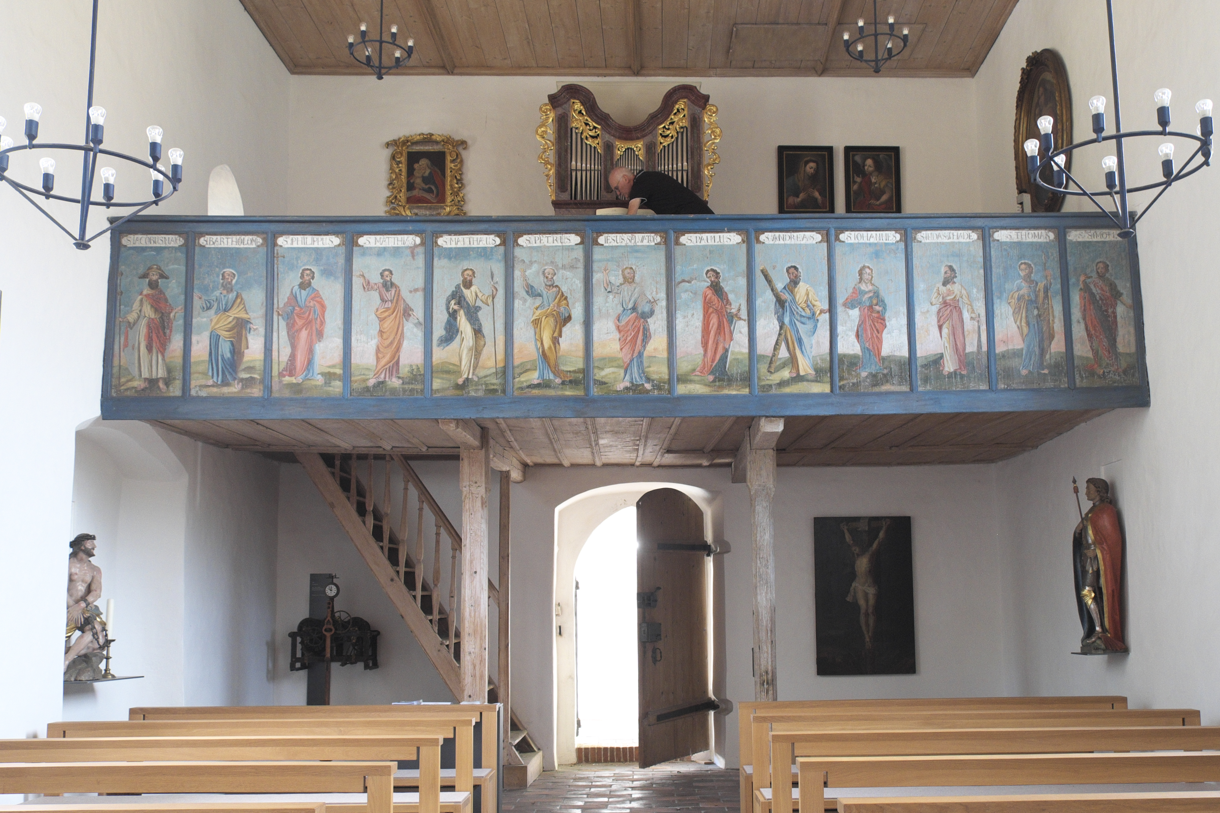 Alte katholische Pfarrkirche St. Georg in Obermenzing im Stadtbezirk Pasing-Obermenzing in München (Bayern/Deutschland), Empore mit barocken Apostelbildern, in der Mitte Darstellung Jesu